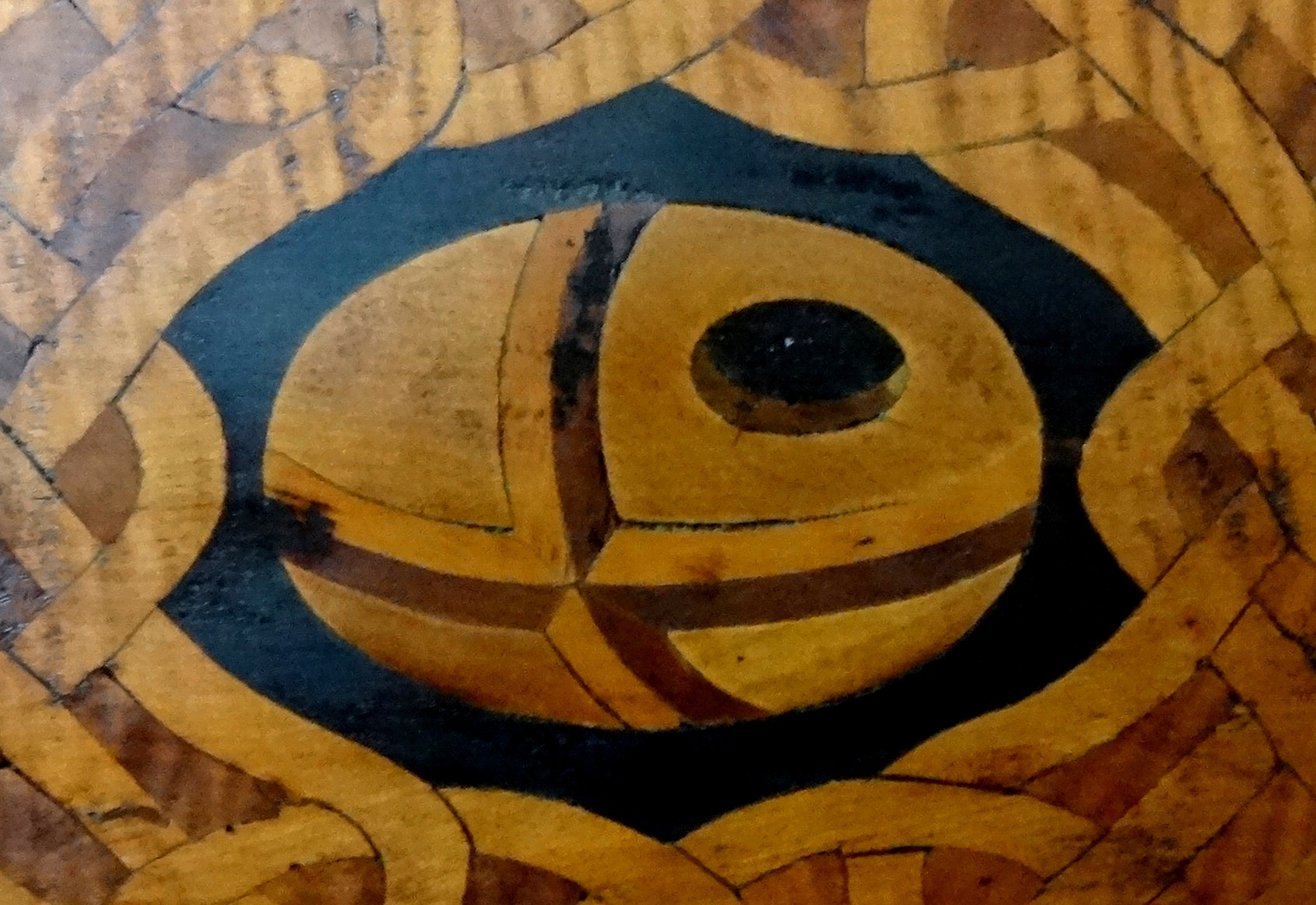 Intarsio di un uovo nel coro della Basilica di San Domenico a Bologna (1541-1549)